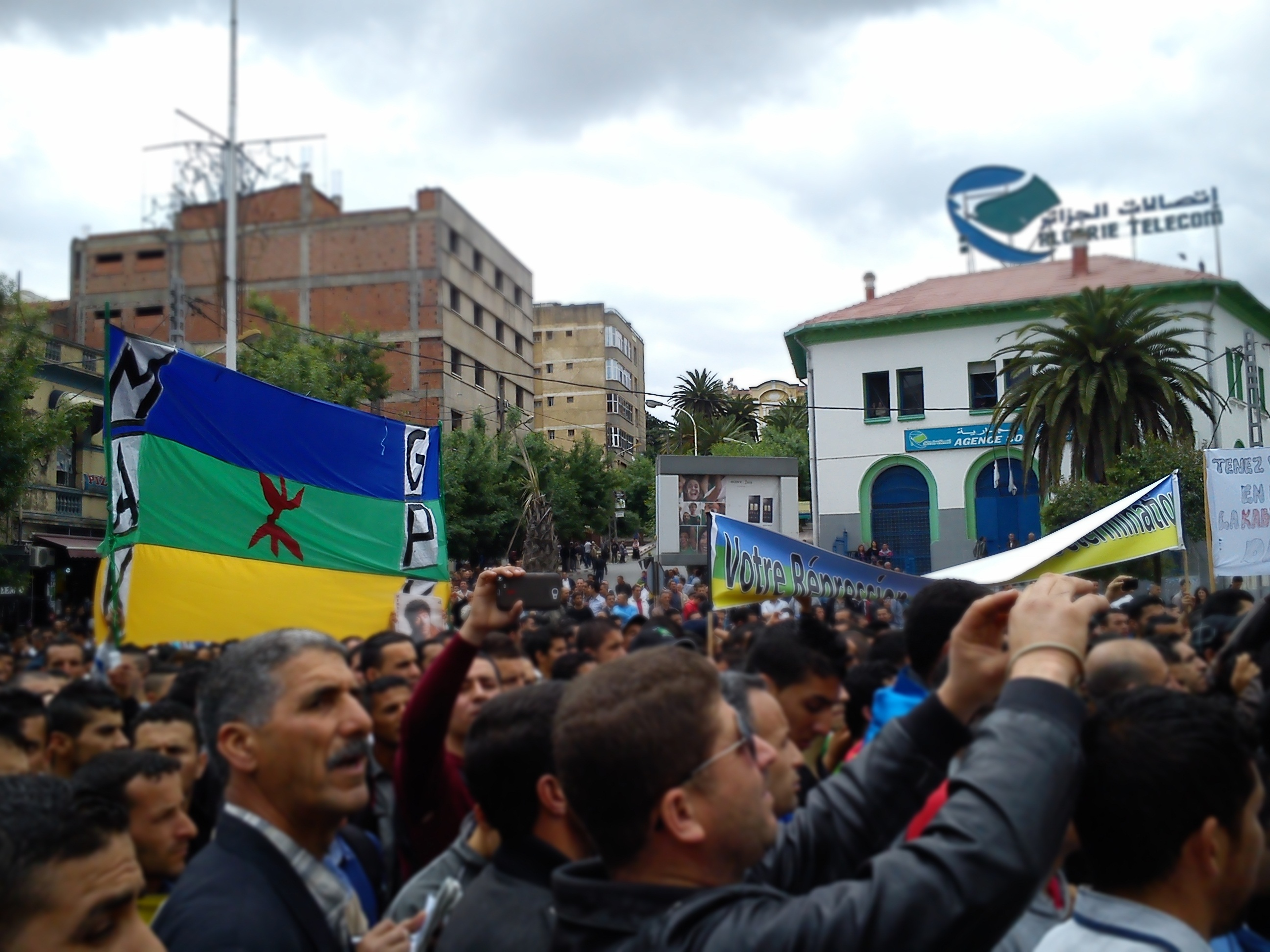 Marche du Mouvement pour l'Autodétermination de la Kabylie le 27 avril 2014 contre la répression de la marche du 20 avril 2014.